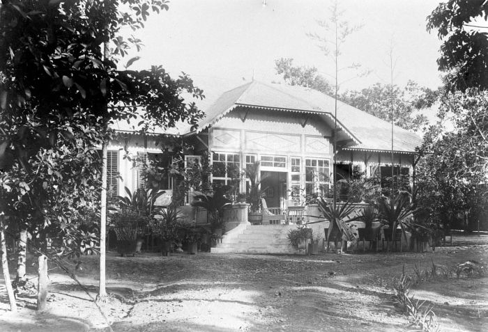 Repronegatief. Woning van een hoofdambtenaar te Manggar